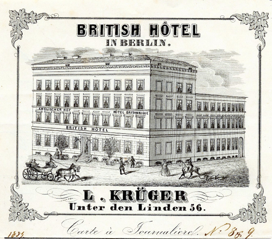 Bild von der Tageskarte von 1854 des Hotels (Carte a Journalierel)